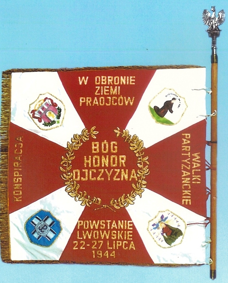 Sztandar Obszaru Lwowskiego AK